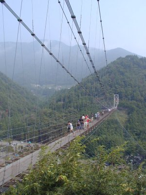 奈良県吉野郡十津川村の谷瀬の吊橋 Tanise-no Tsuribashi at Totsukawa, Nara Japan